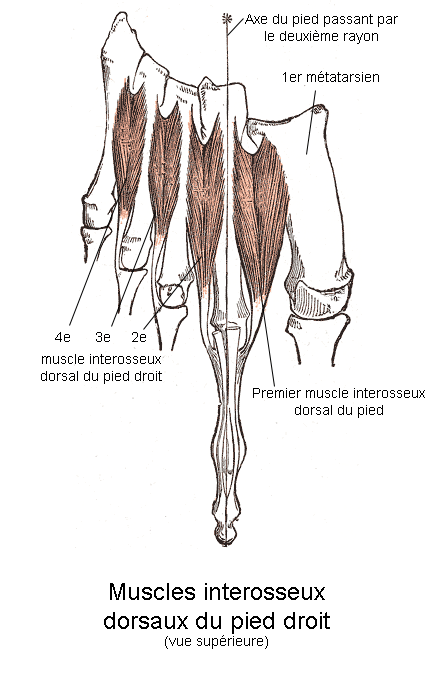 Muscles interosseux dorsaux du pied droit. Anatomie humaine